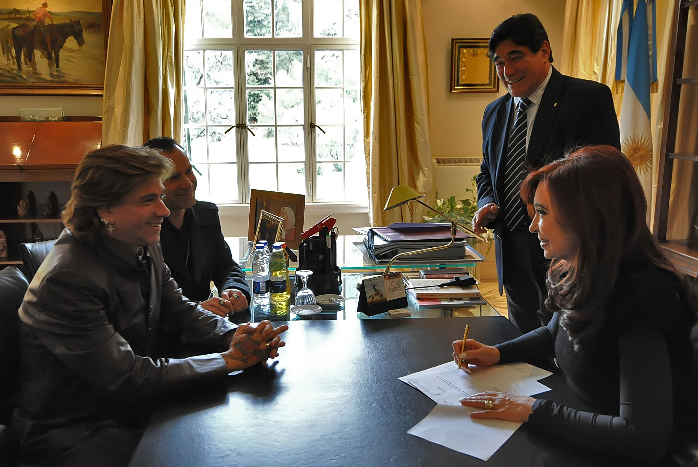 Cristina Fernández recibe en audiencia en la recidencia presidencial de Olivos al diseñador Roberto Piazza. Junto a ellos, el secretario legal y técnico de la Presidencia, Carlos Zanini.